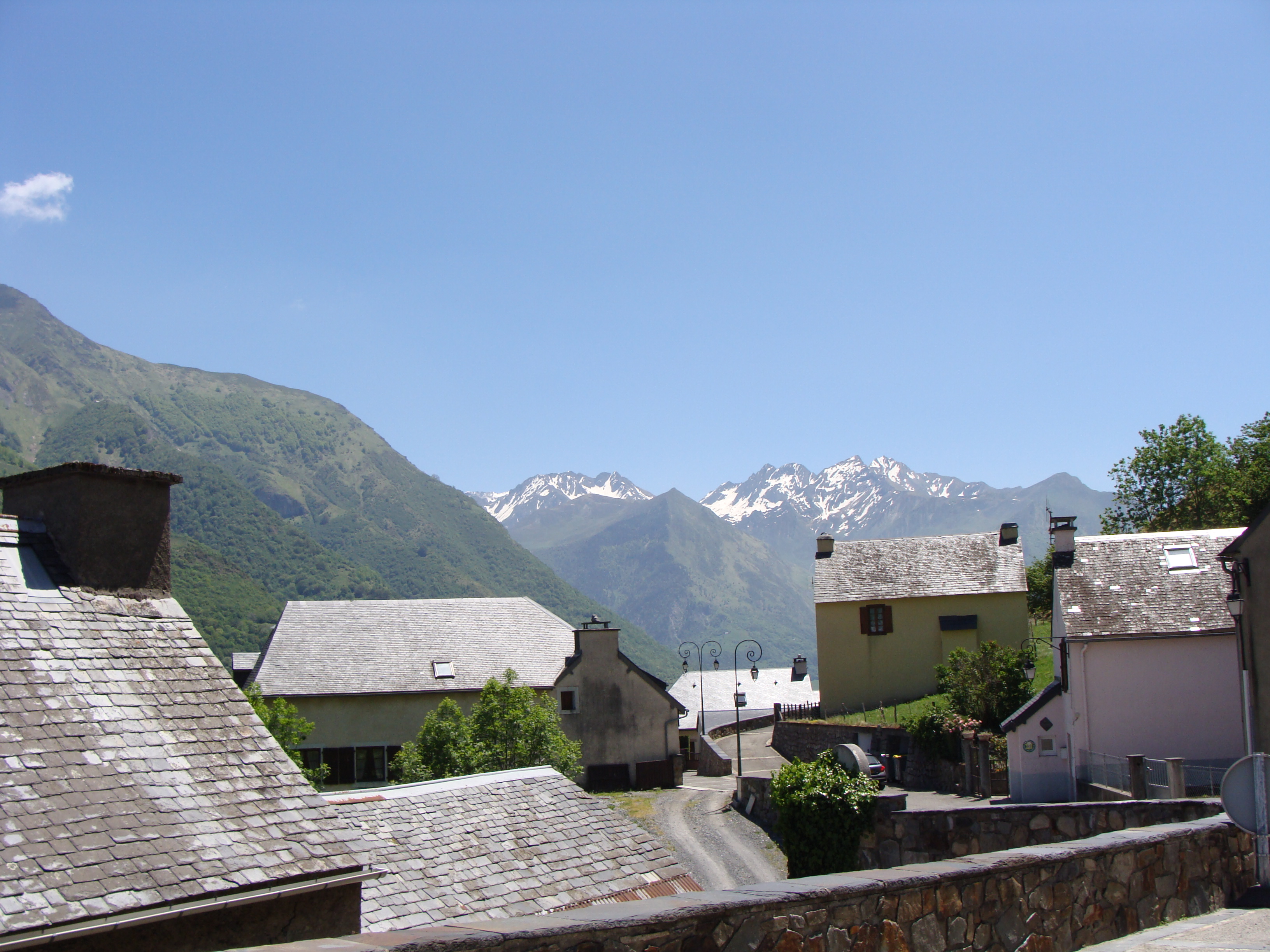 Viscos - Vue générale